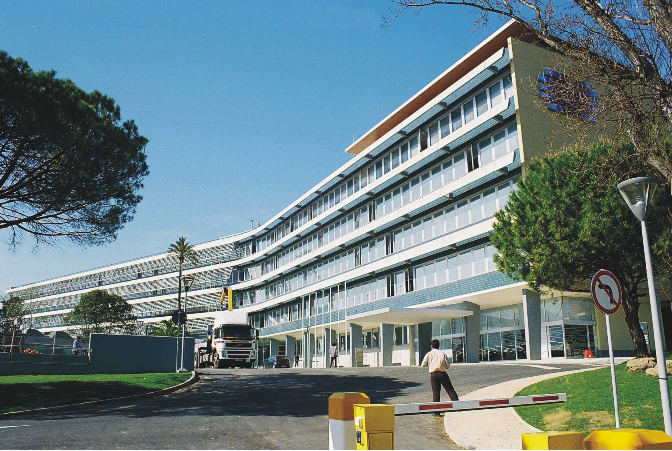 RTP's headquarters / Sede da RTP